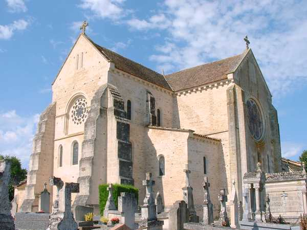 Collégiale Notre-Dame de Montréal (Yonne)